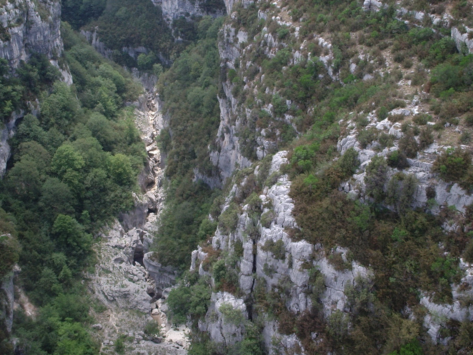 Gorges du Verdon